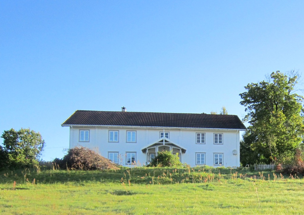 Holmen prestegård, Sigdal